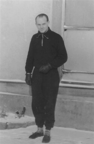 German footballer Horst Franke in 1979